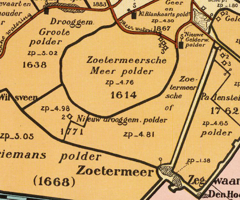 Zoetermeersche_of_Nieuw_Drooggemaakte_Polder